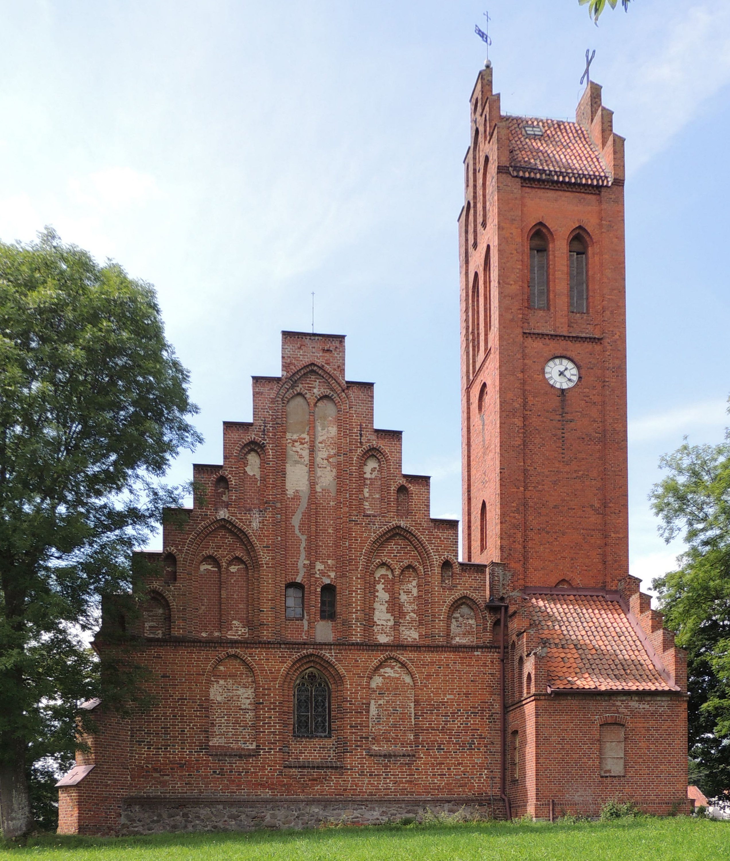 Milejewo - rzymskokatolicki kościół parafialny p.w. św. Stanisława, 1380-1389, 1639, 1856-1860